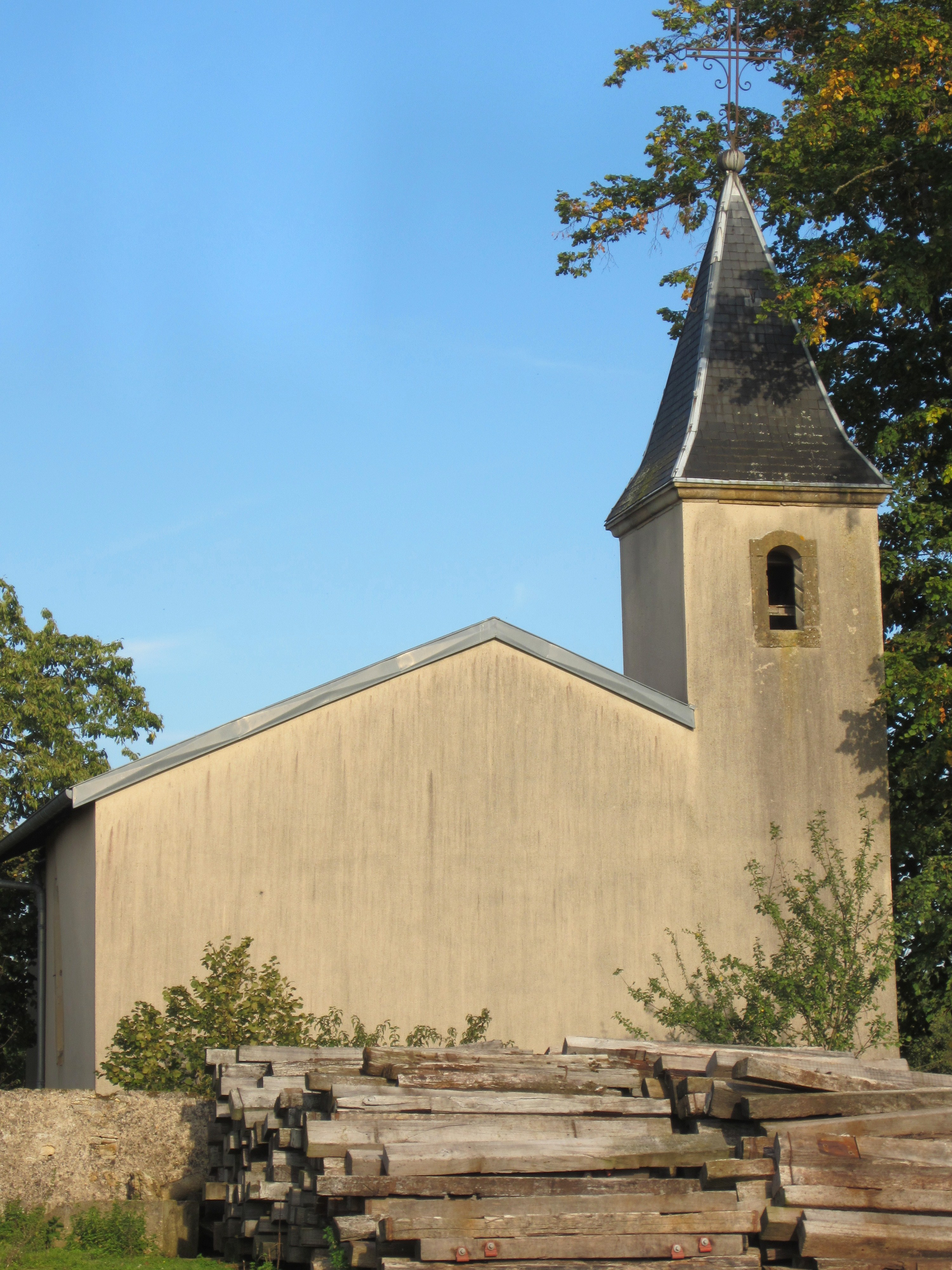 Description eglise Bussieres Chambley eglise Bussieres Chambley